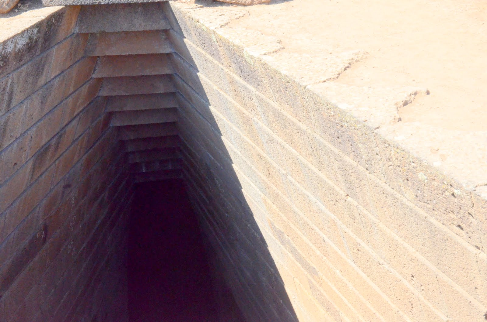 Santa Cristina Pozzo Sacro copertura aggetto pietre